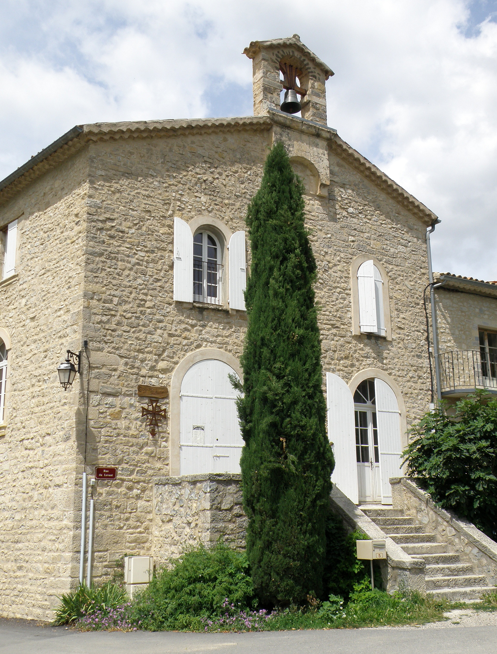 Sainte-Euphémie-sur-Ouvèze (comm. de la Drôme, France). Temple protestant.